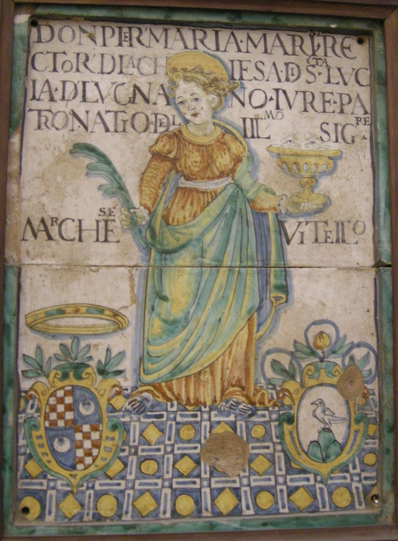 Città di castello, museo del duomo, ceramica con dedica alla famiglia vitelli, xviii sec.